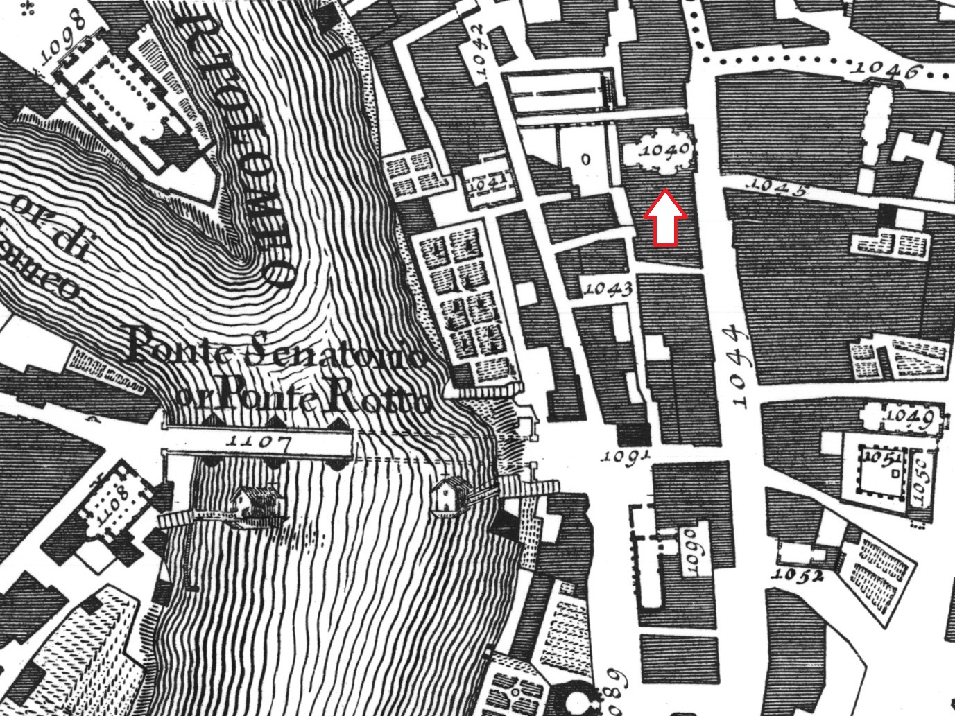 Santa Galla Antiqua